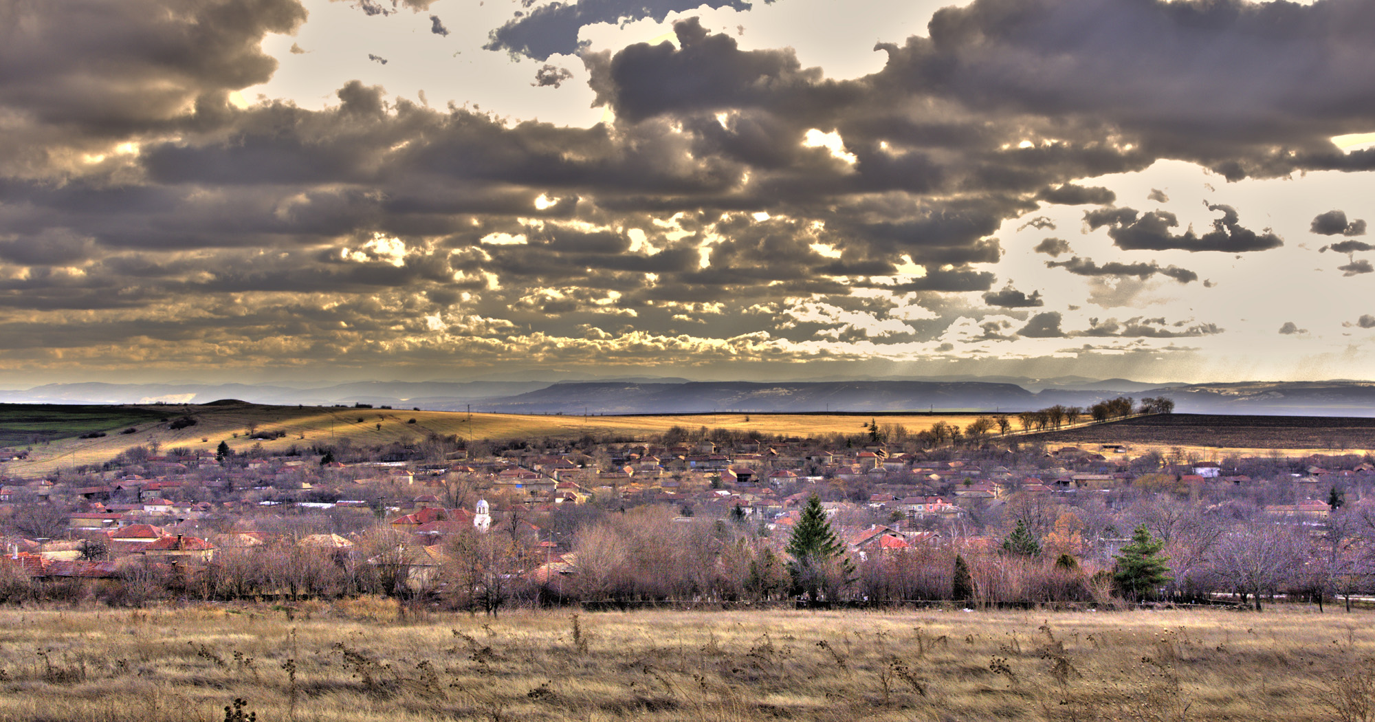 Село Стефан Стамболово